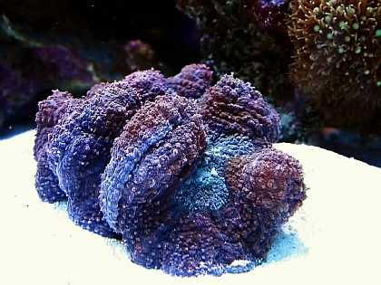 Lobophyllia hemprichii en acuario